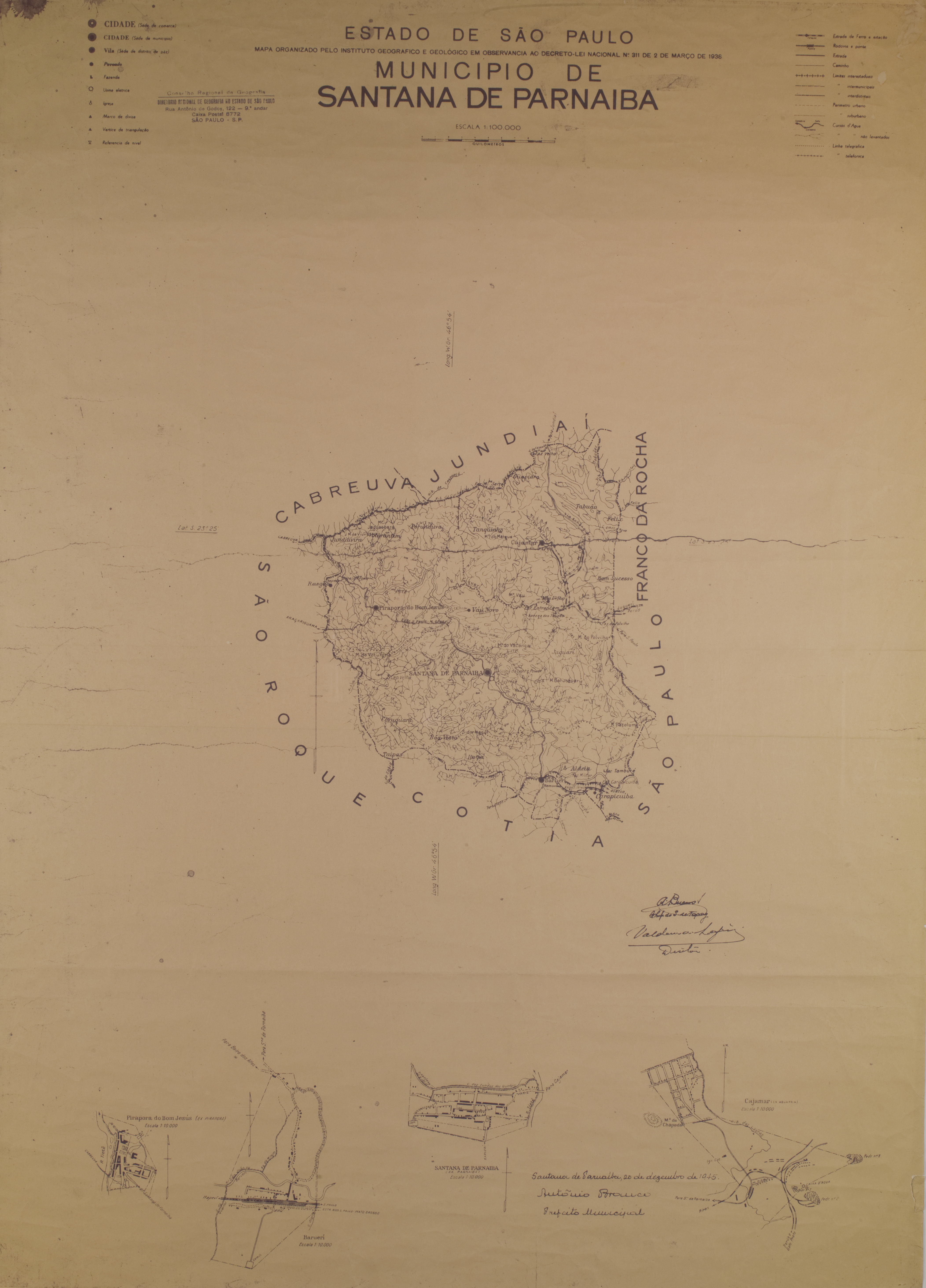 Obra que integra o acervo do Museu Paulista da USP. Coleção João Baptista de Campos Aguirra - Ref. Agente: Instituto Geográfico e Geológico - Estado de São Paulo